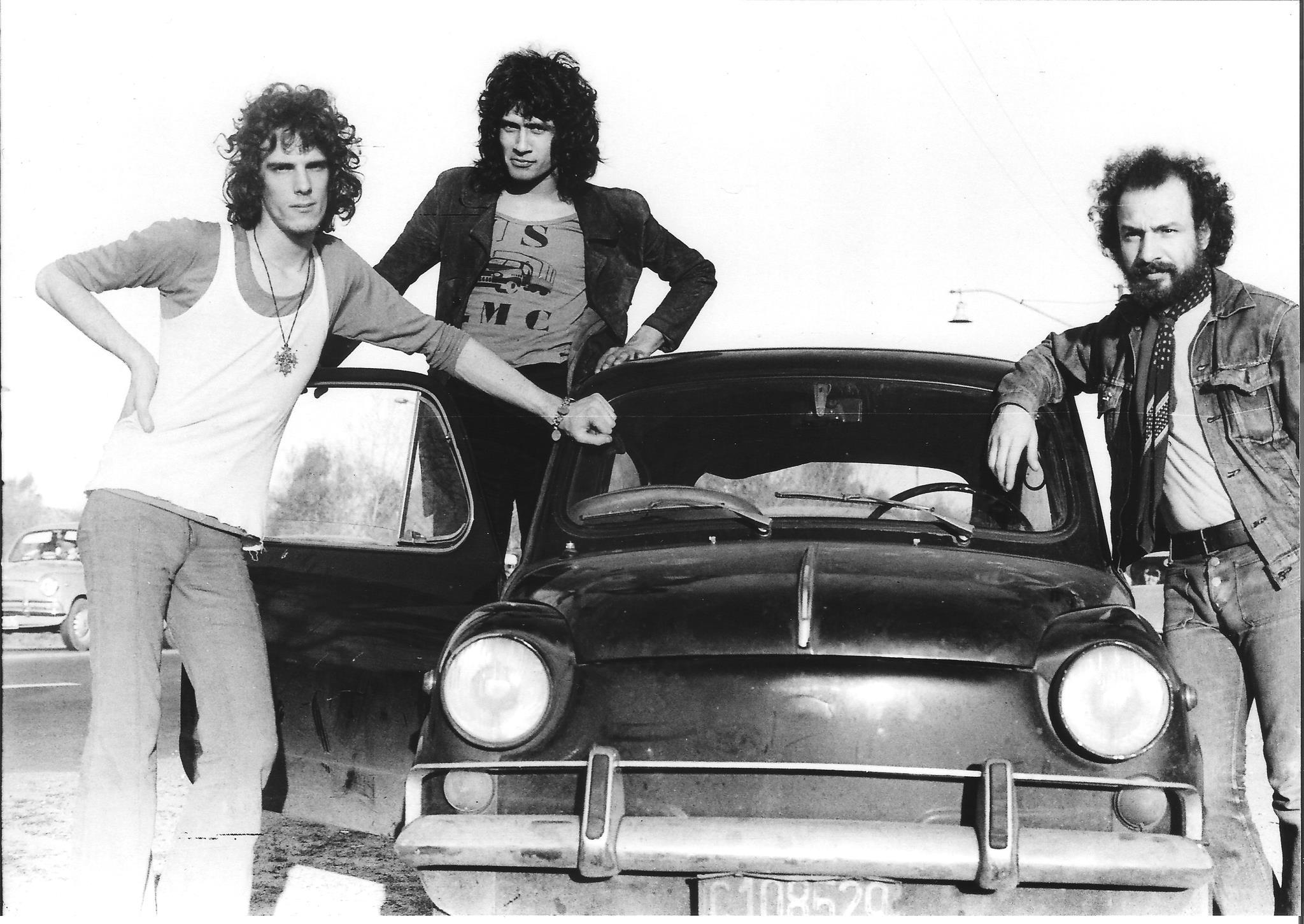 Pescado Rabioso (sin Bocón Frascino) circa 1972.